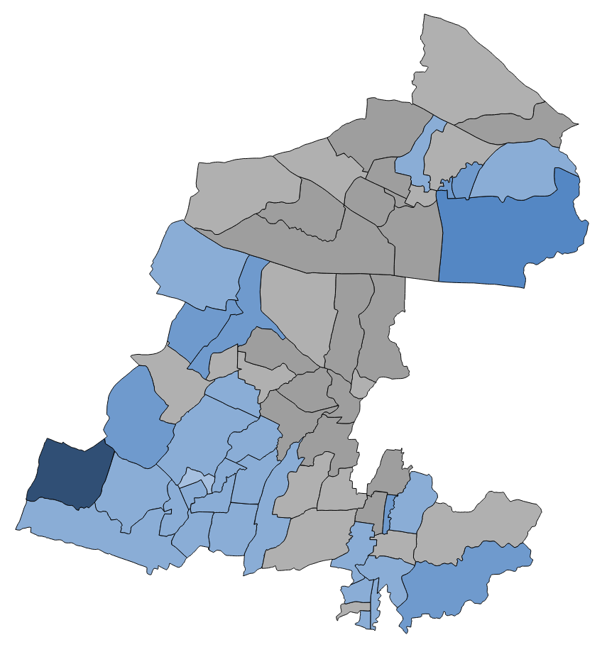 顏色對照表